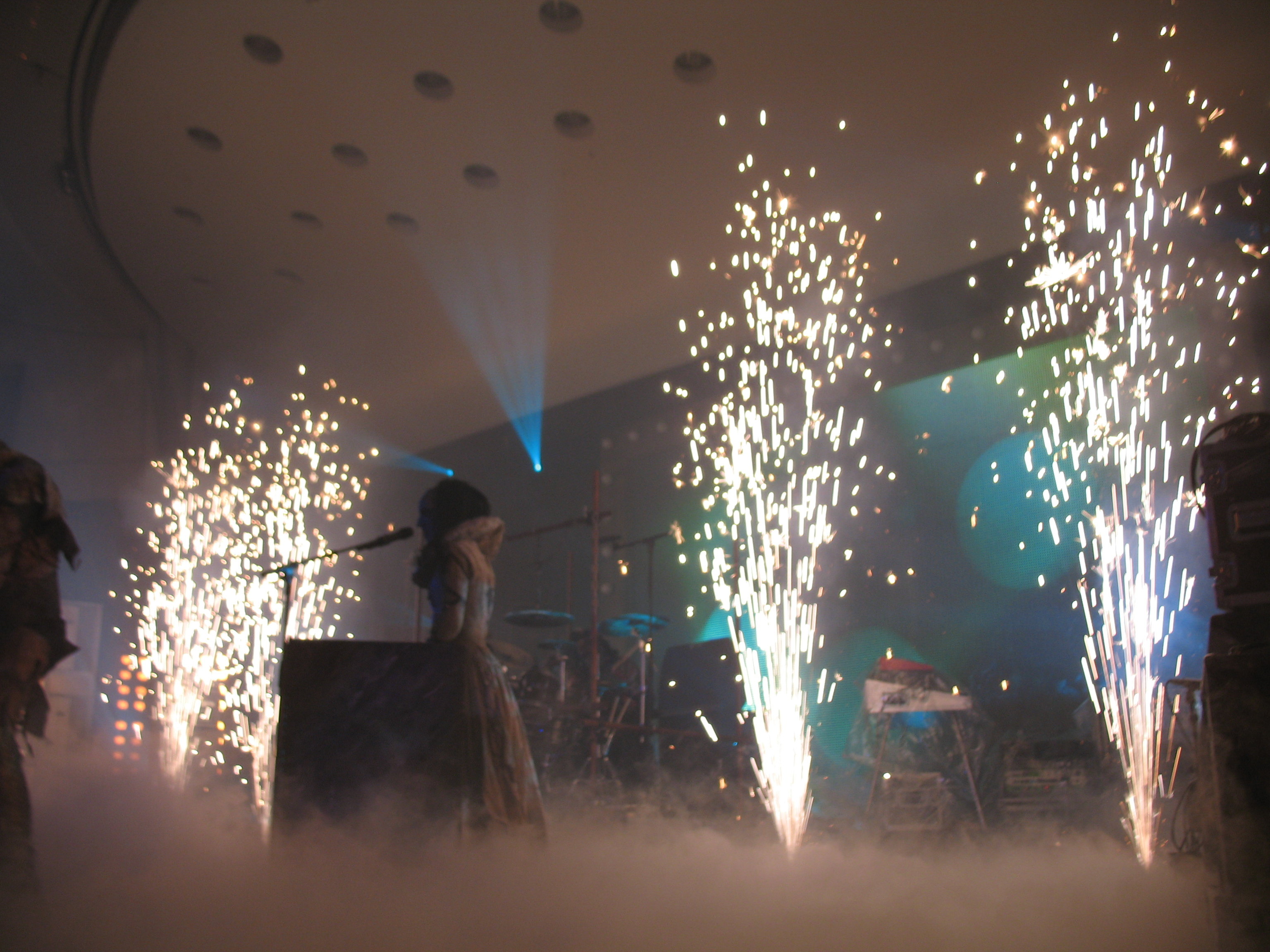 Lordi's pyrotechnic